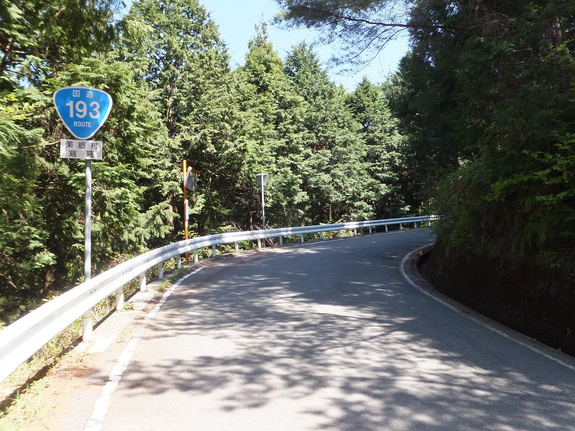 国道193号、吉野川市美郷倉羅